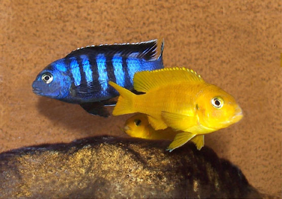 Pseudotropheus saulosi male (back) and female (front)